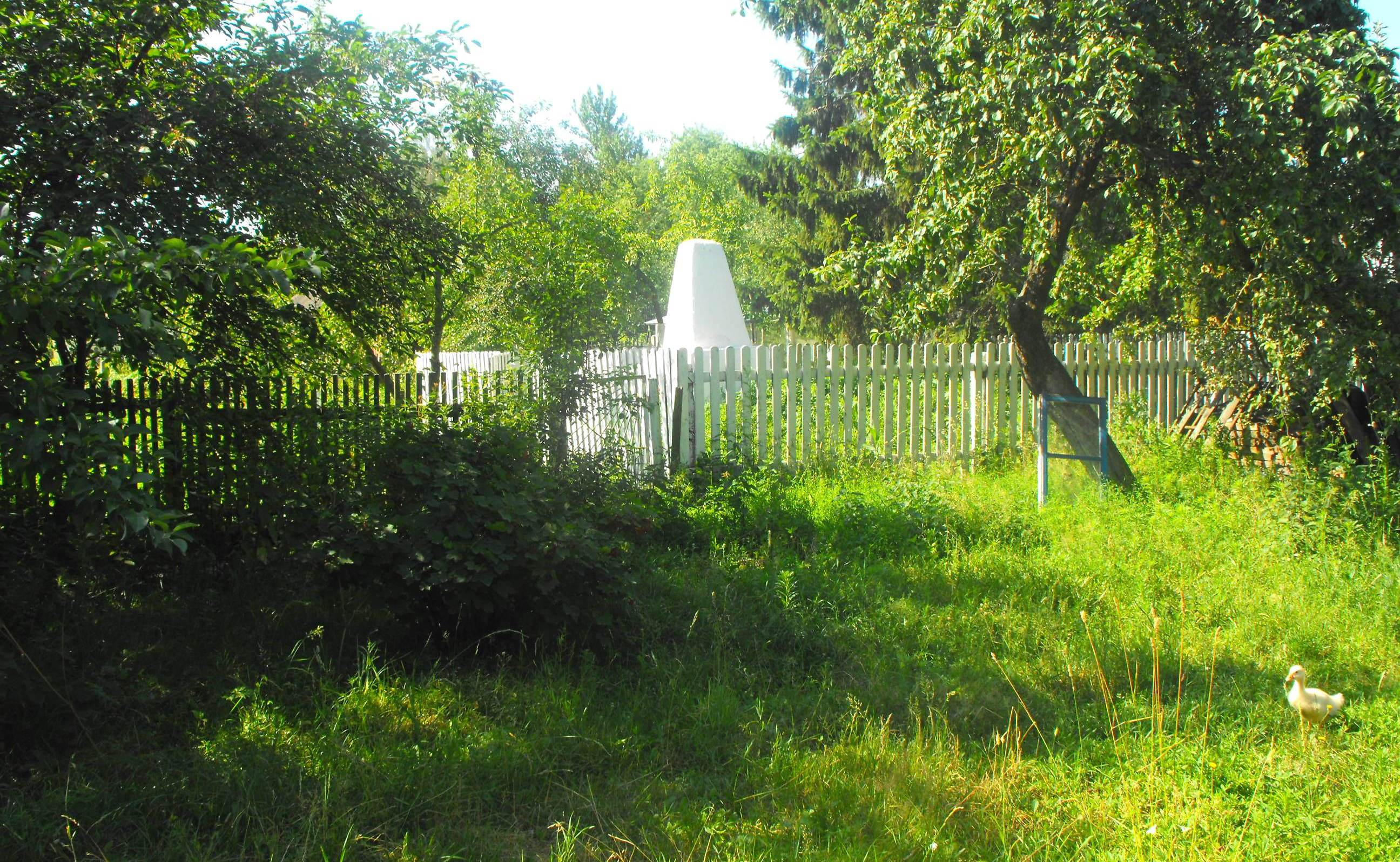 Один из двух памятников на братских могилах евреев деревни Погост Солигорского района Беларуси, убитых во время Холокоста. На табличке с надписью указано число убитых - 180 человек.